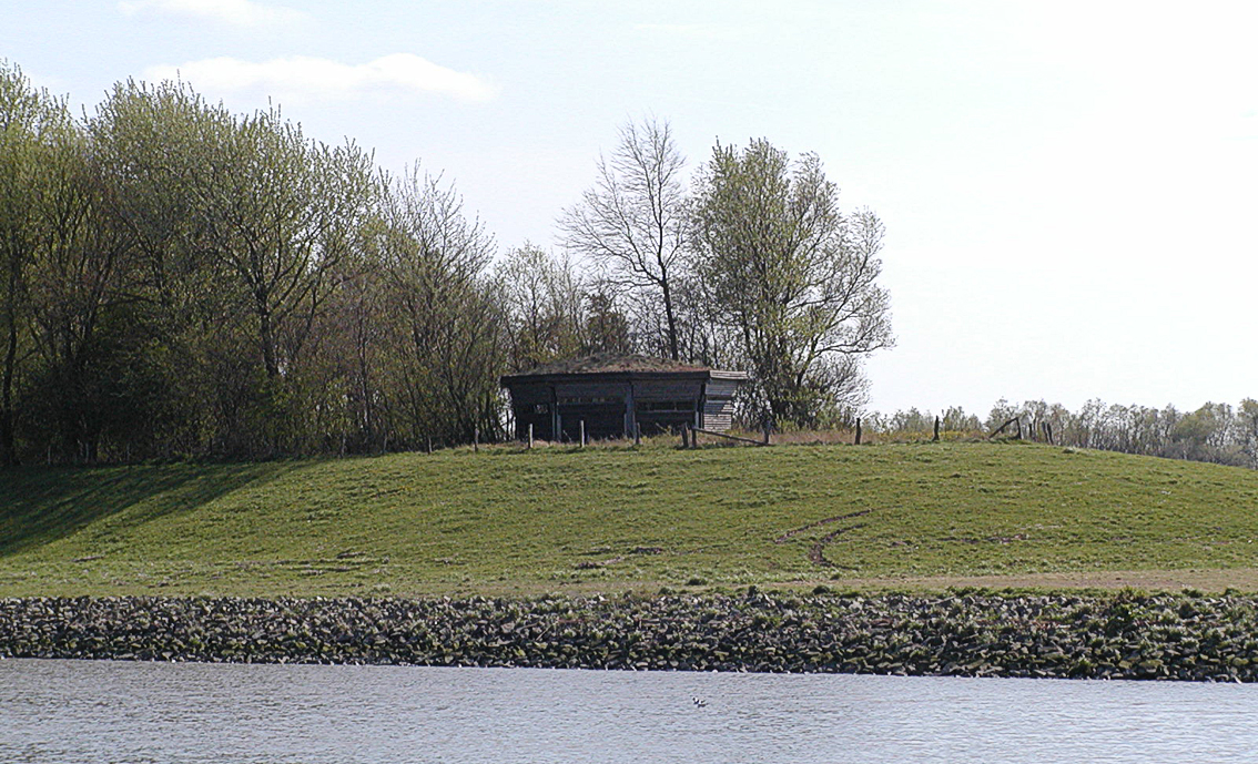 Der Unterstand zur Vogelbeobachtung im Natureum in Balje, Deutschland.